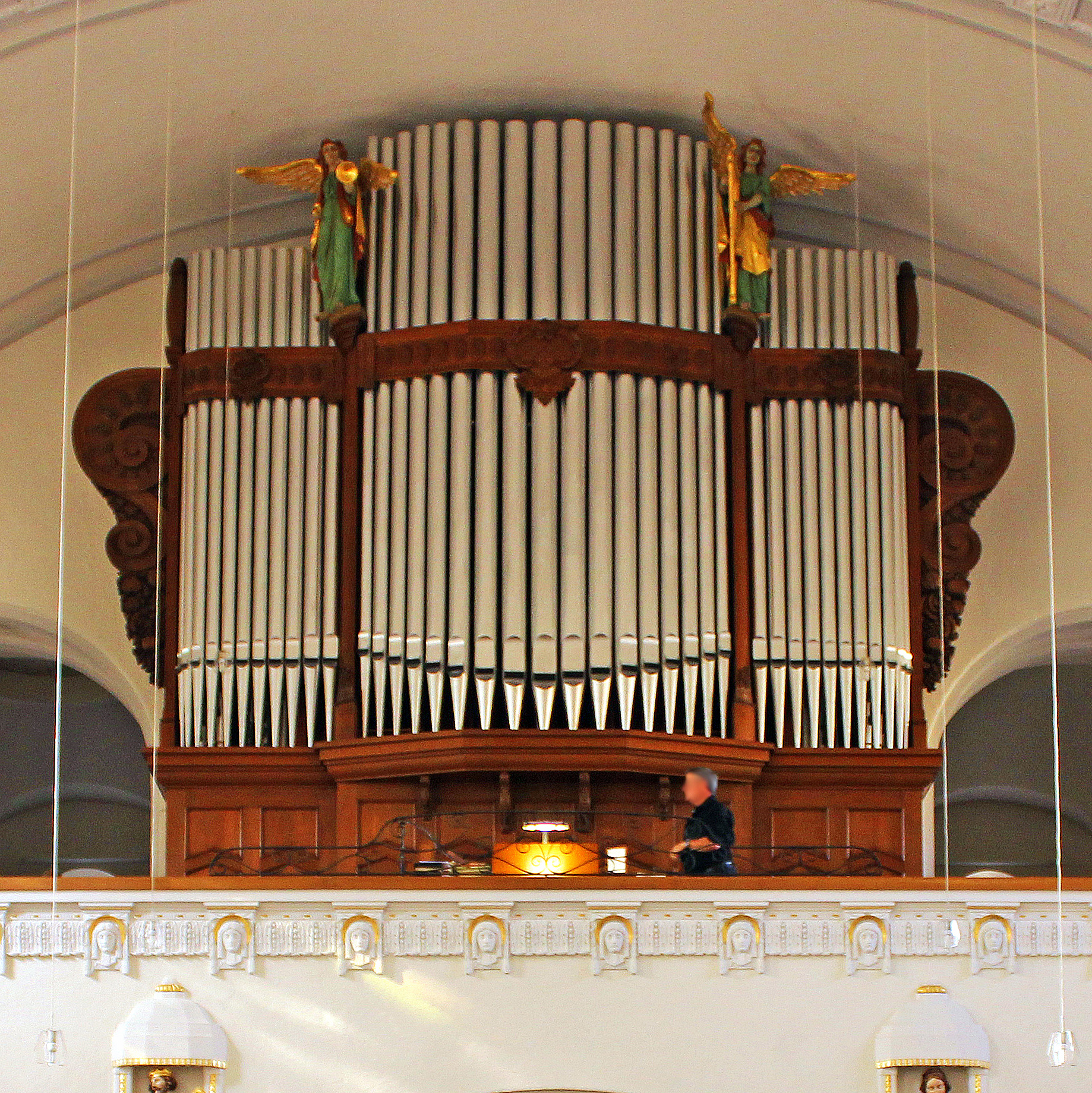 Orgelempore der katholischen Pfarrkirche St. Eligius in Völklingen, Saarland